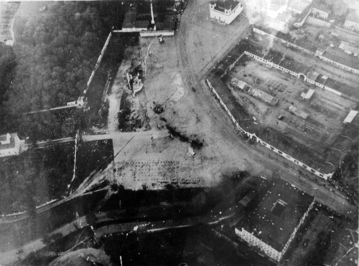 Беларуская (тарашкевіца): Гомель (Homiel), пляц Рынак (plac Rynak). Касьцёл Унебаўзяцьця Найсьвяцейшай Панны Марыі. Аэрафотаздымак